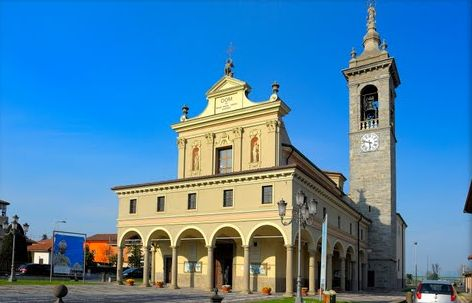 Fotografia della chiesa di Santa Maria d'Oleno in Sforzatica (frazione del comune di Dalmine), la più antica delle chiese parrocchiali sul territorio comunale, consacrata nel 1595.